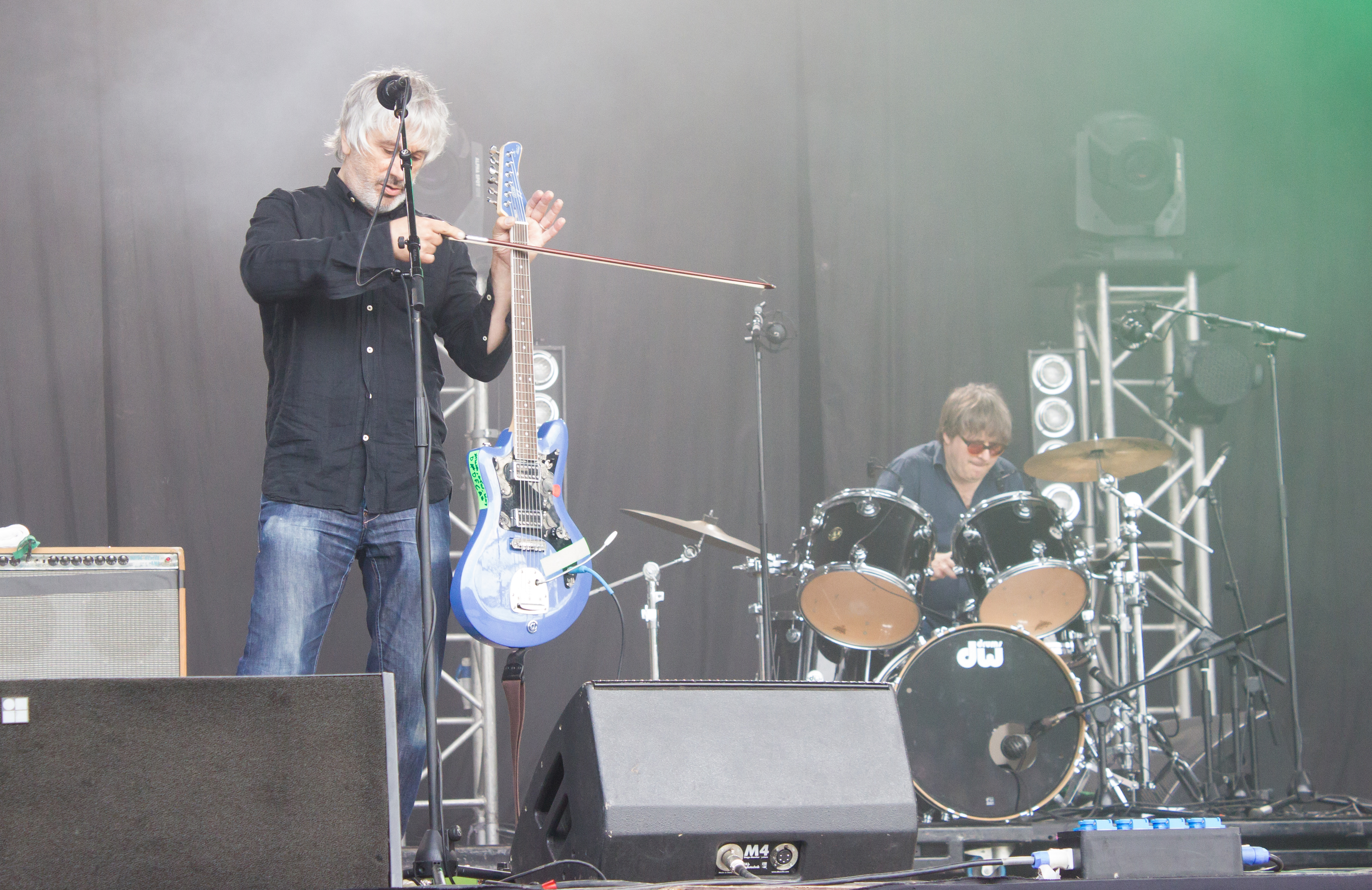 Lee Ranaldo actuando como Lee Ranaldo and The Dust no NOS Primavera Sound 2014 de Porto.